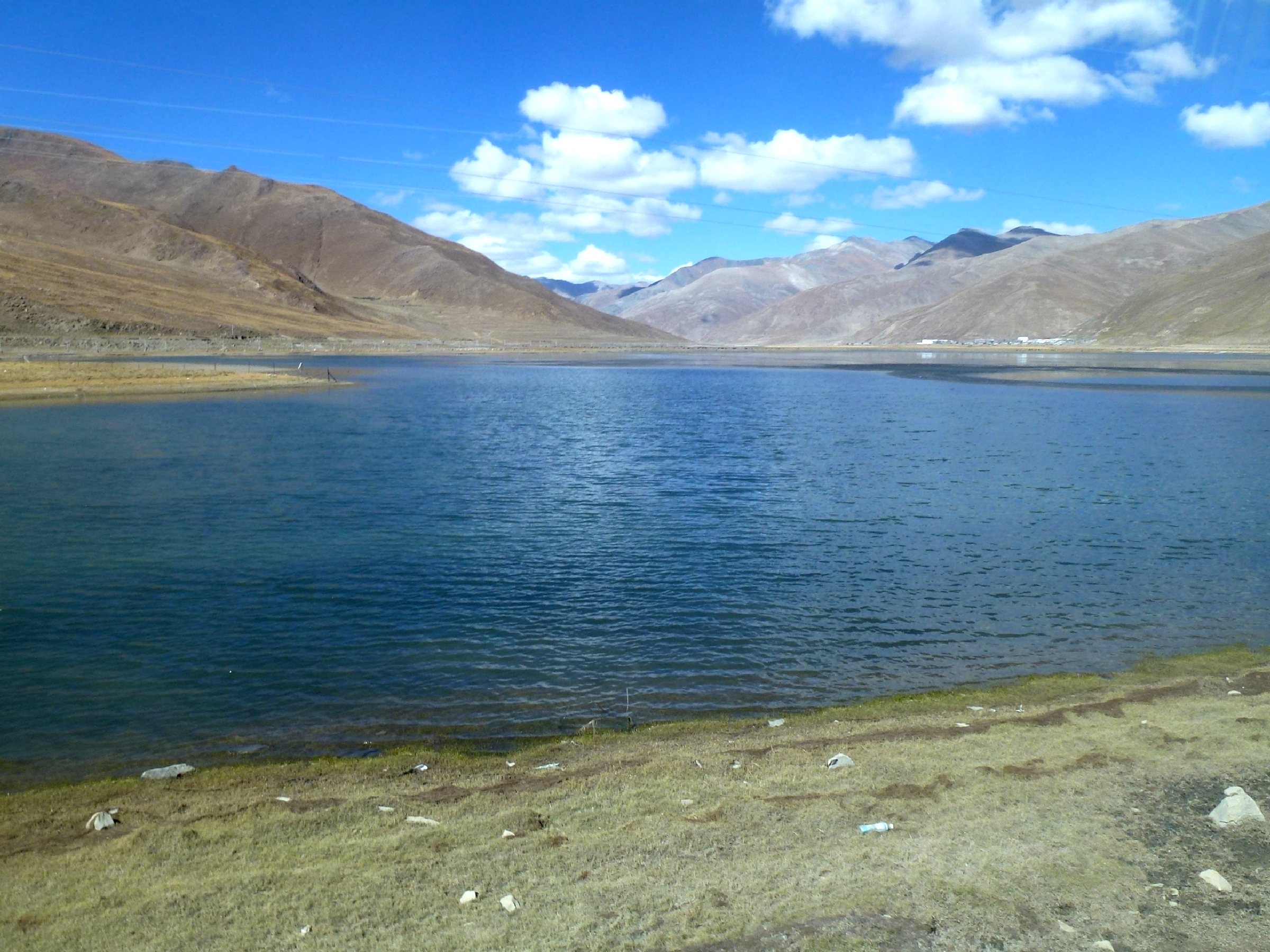 Nagarzê Tibet China 西藏 浪卡子县 空母错湿地